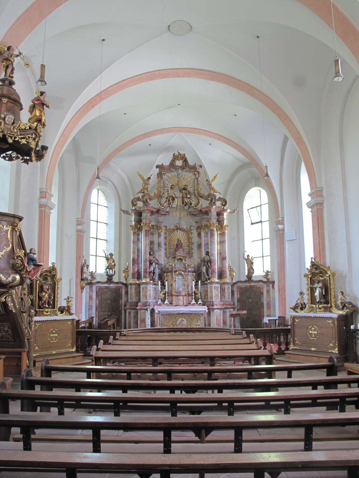 Schankweiler Klause, Blick auf den Hochaltar.